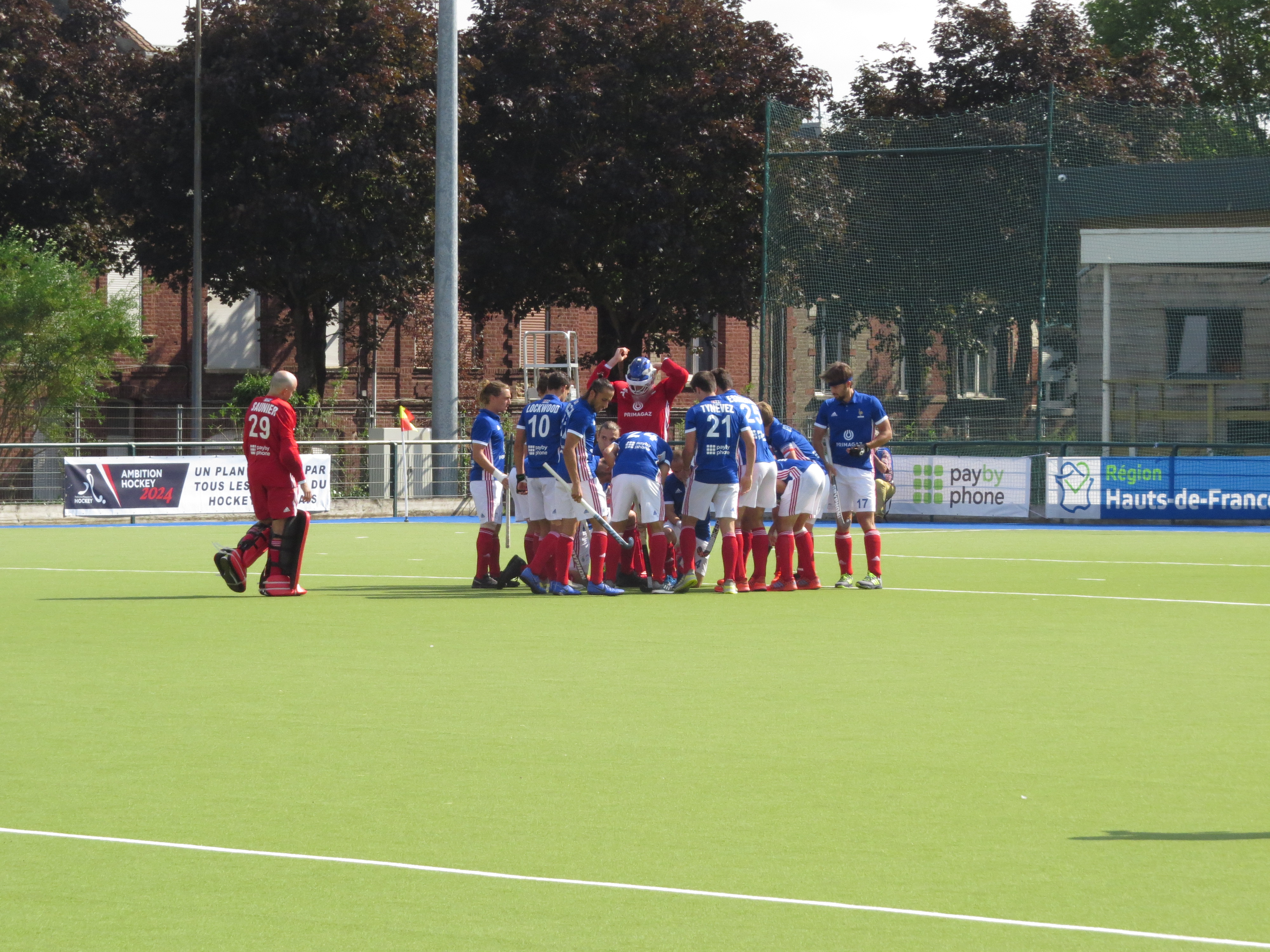 Match entre l'Autriche et la France au Men's EuroHockey Championship II à Cambrai